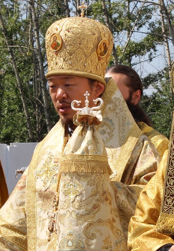 епископ Кызыльский и Тувинский Феофан (Ким)